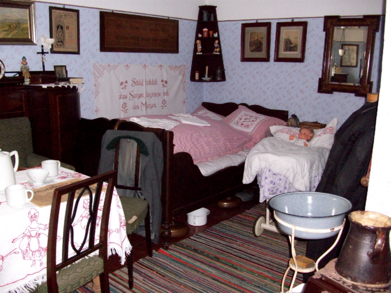 Blick in den Wohn- und Schlafbereich der wiedereingerichteten Gesindewohnung im Umstädter Gruberhof